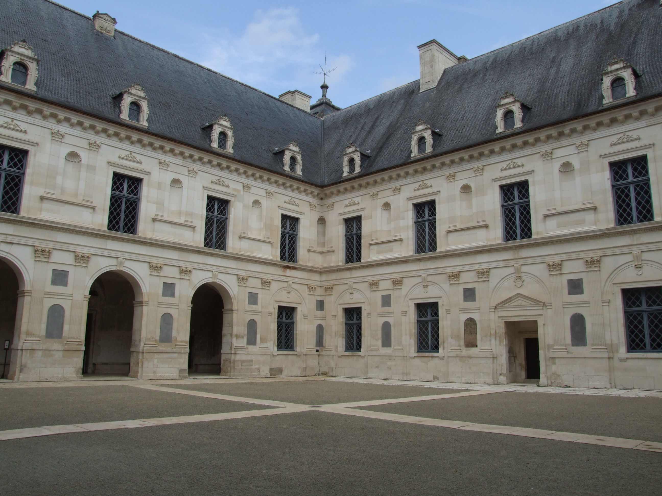 Château d'Ancy-le-Franc, Yonne, Bourgogne, FRANCE